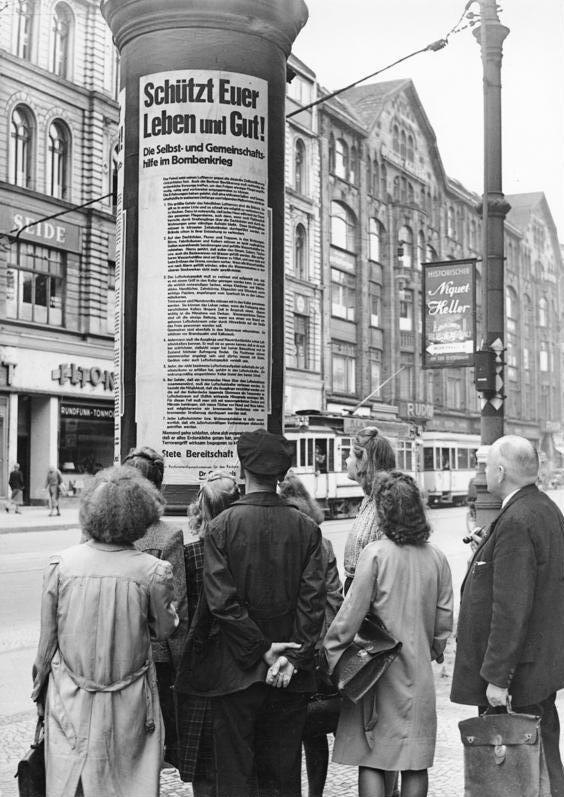 Berlin, Anschlagsäule Berlin abwehrbereit gegen den Luft-Terror An den Anschlagsäulen sind Aufrufe des Gauleiters Reichsministers Dr. Goebbels veröffentlicht mit Richtlinien und Hinweisen für das Verhalten bei Angriffen. 11.8.1943 [Berlin.- Litfaßsäule mit Anschlag "Schützt Euer Leben und Gut!"]